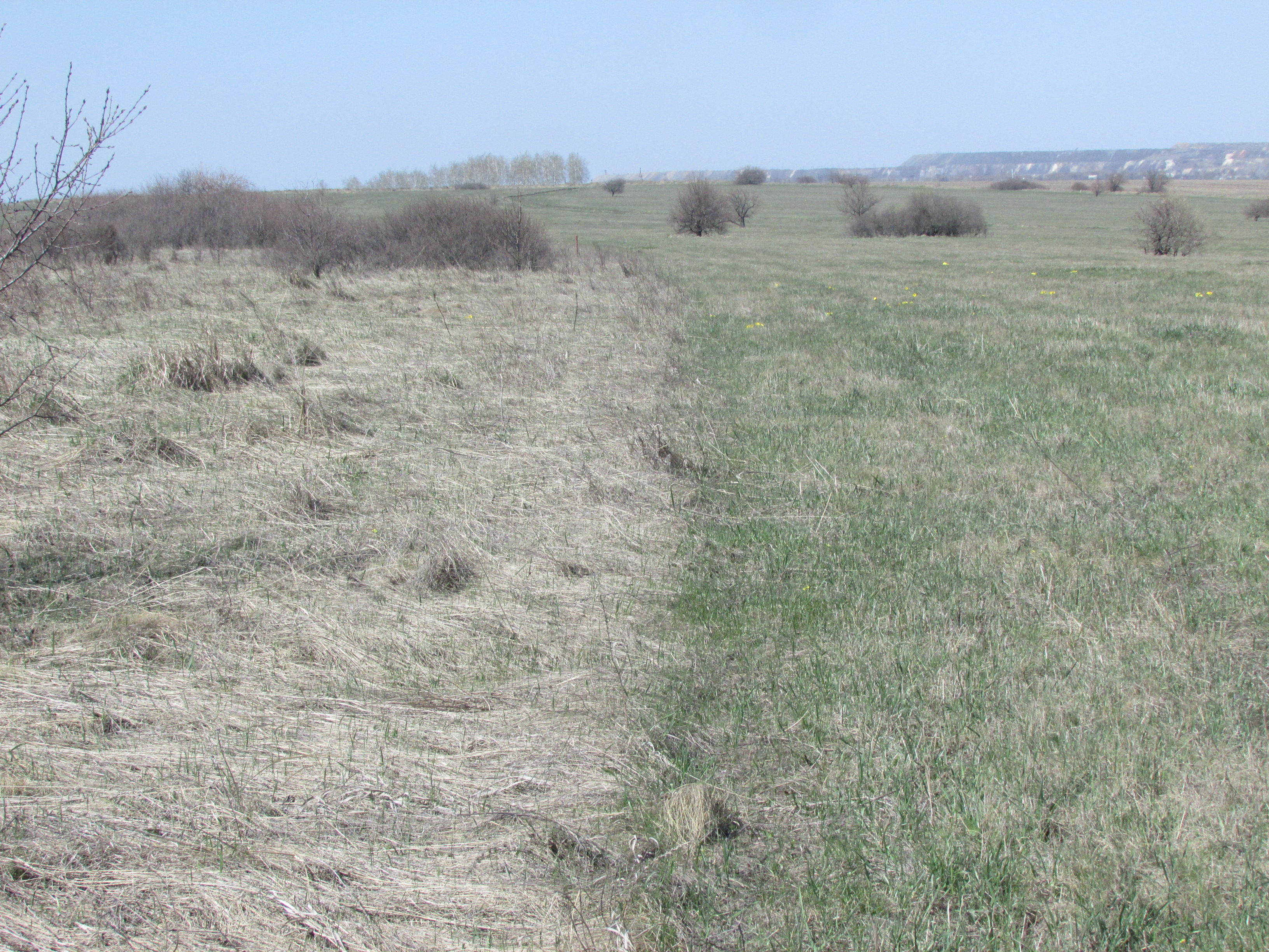 Ямская степь. Участок с абсолютно-заповедным режимом